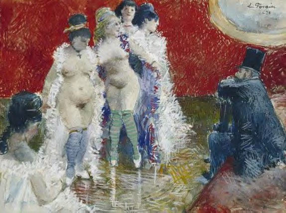 The clientlabel QS:Lde,"Der Kunde"label QS:Len,"The client"label QS:Lfr,"Le client"